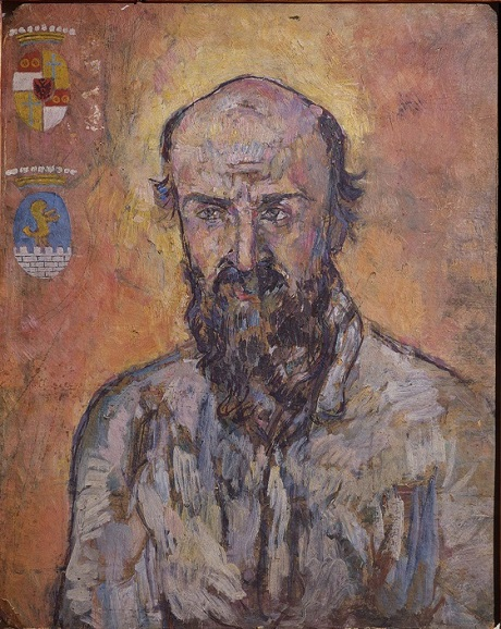 Портрет графа Юрия Александровича Олсуфьева